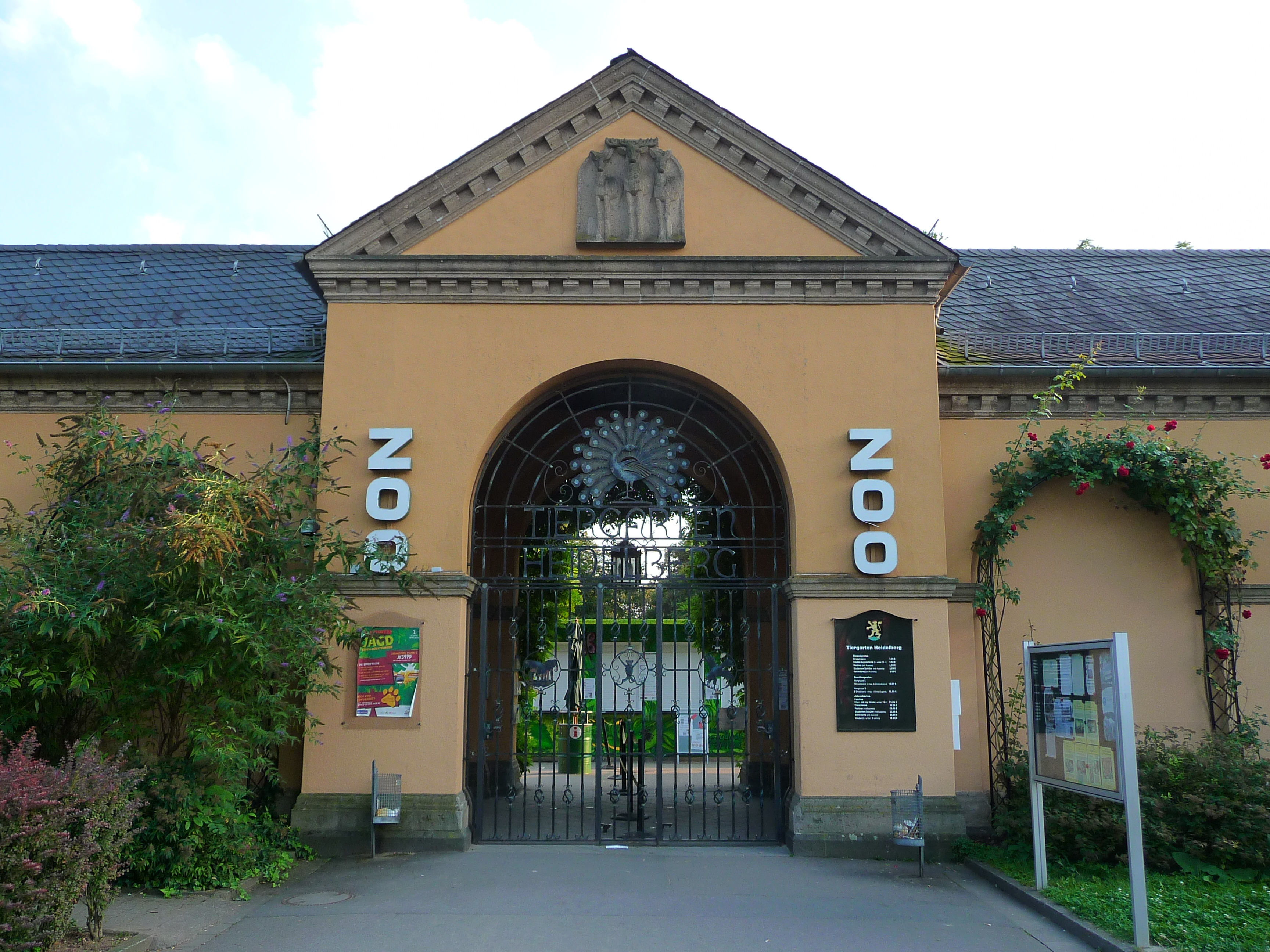 Haupteingang / Besuchereingang des Heidelberger Tiergarten im Neuenheimer Feld